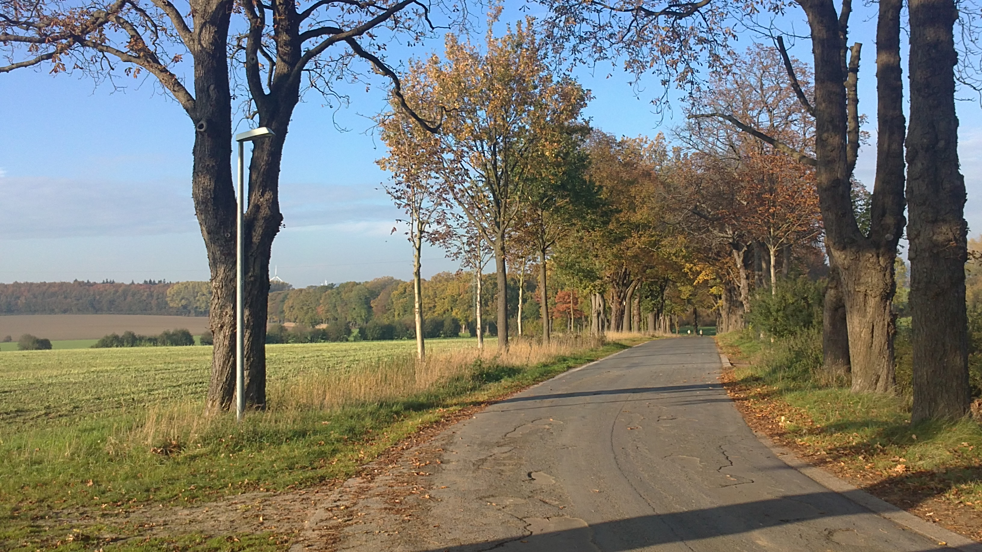 Ulenburger Allee Richtung Häver